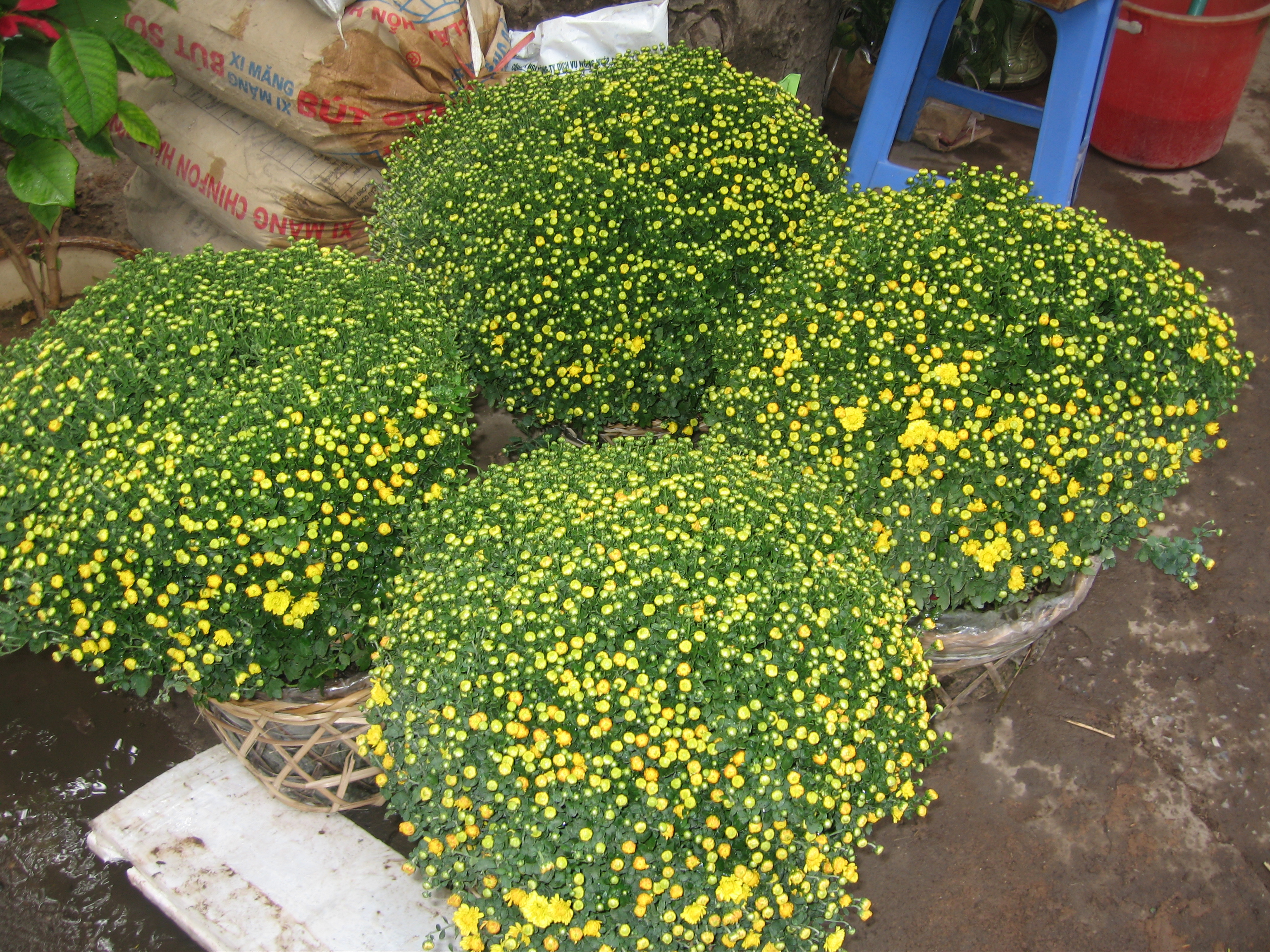 Hình do người truyền lên chụp.